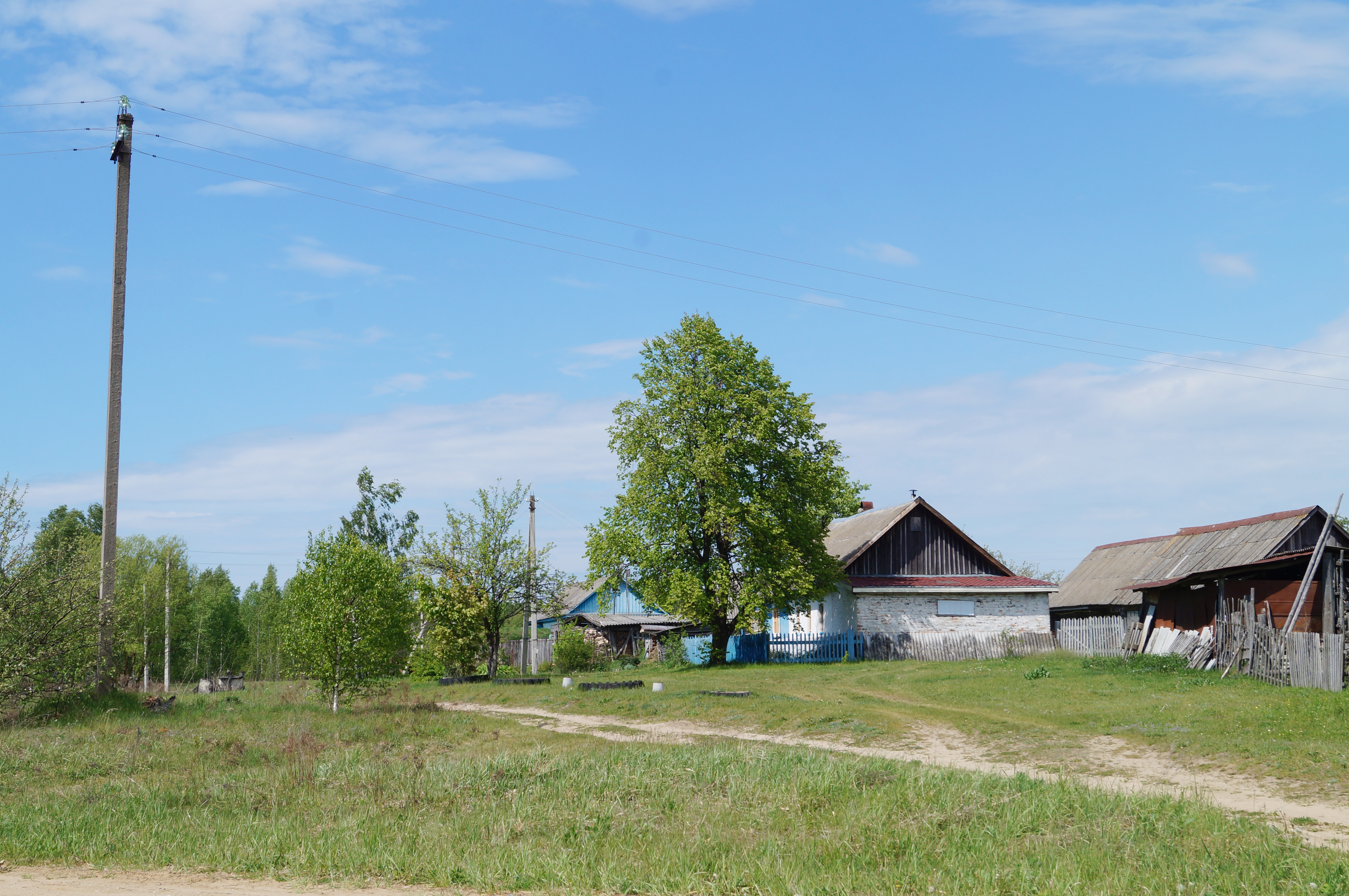 Пыренка (Думиничский район)